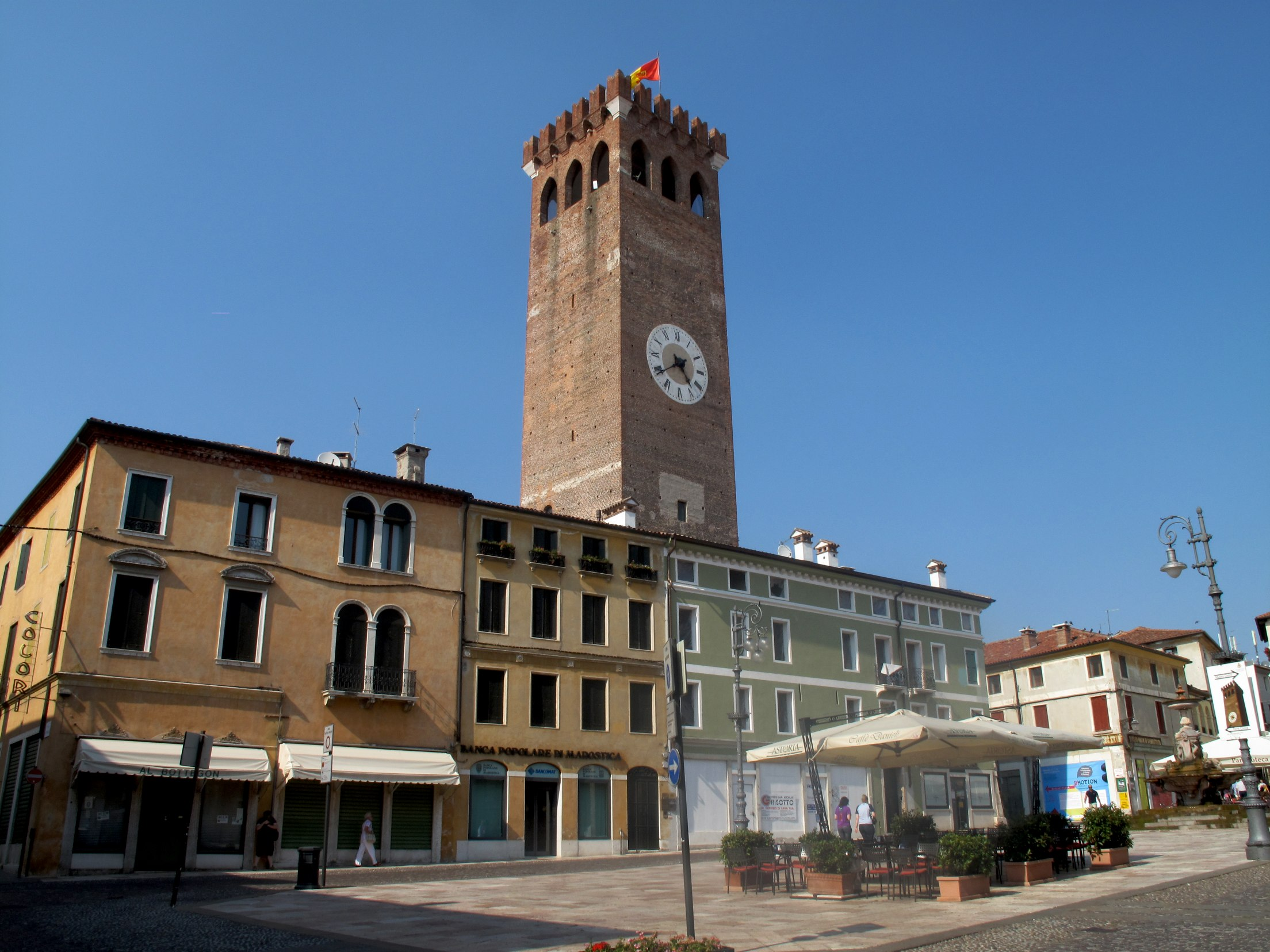 Bassano del Grappa 136